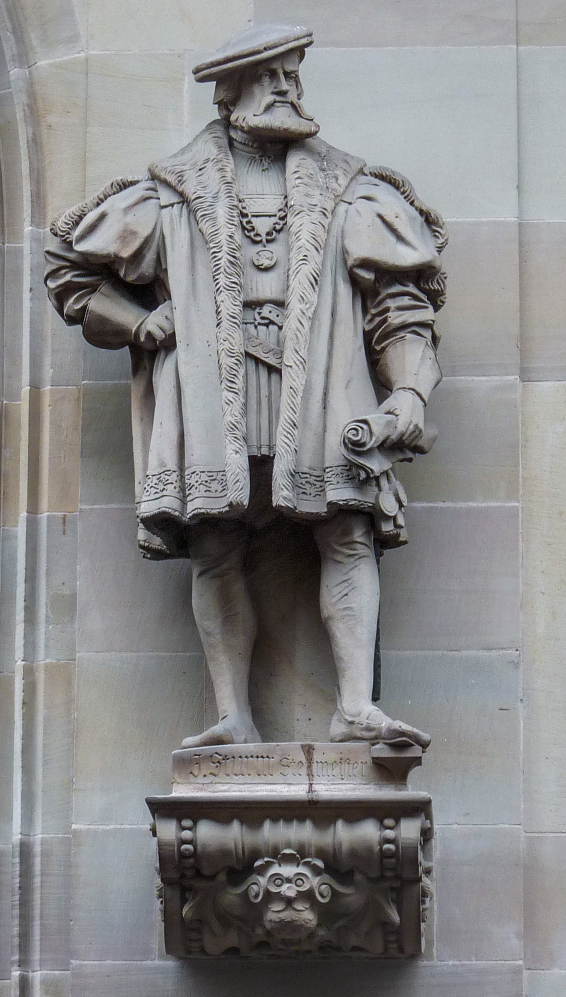 Statue de Jacques Sturm par Alfred Marzolff (1867-1936)[1], portail principal des Petites Boucheries, rue de la Haute-Montée à Strasbourg (à l'arrière de l'Aubette)